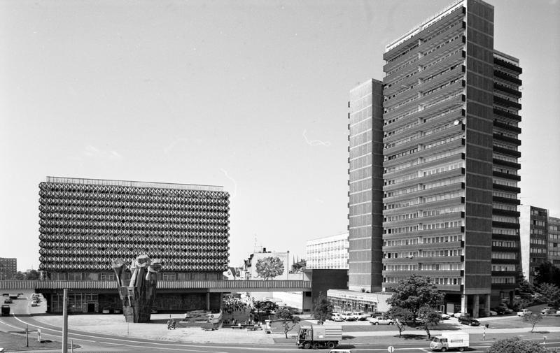 11.-18.8.1991 Bundesland Sachsen-Anhalt Halle Zentrum